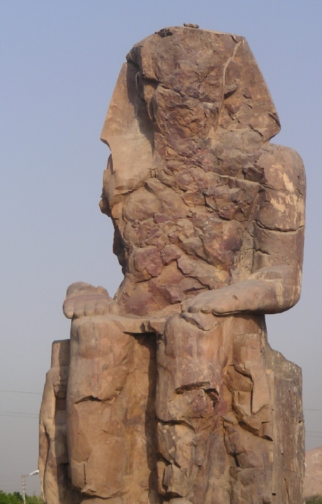 Colosses de Memnon : Colosse sud - Règne d'Amenhotep III - XVIIIe dynastie égyptienne - Kom el-Hettan - août 2005